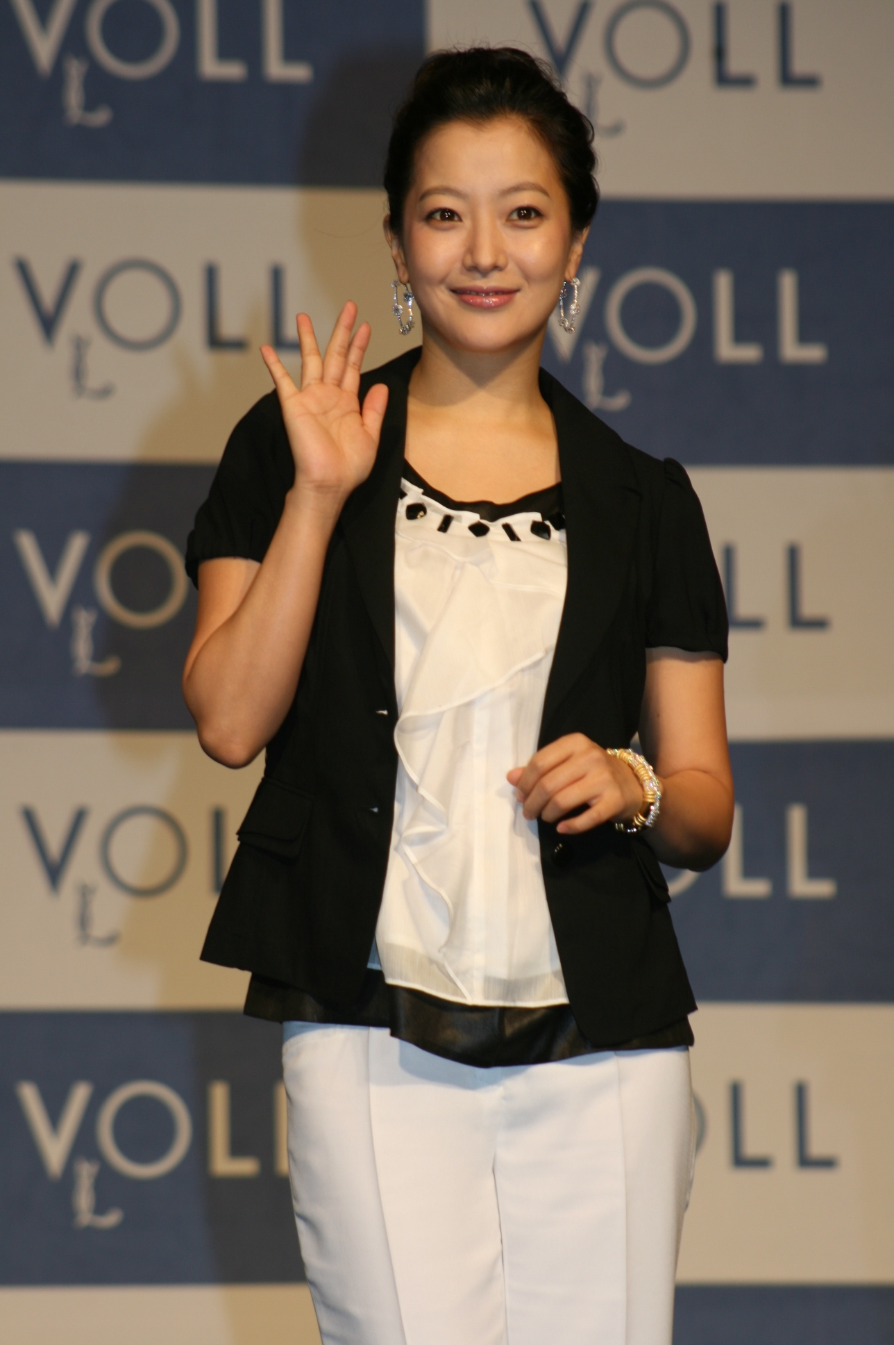 여성복 브랜드 VOLL의 전속모델인 배우 김희선은 2009년 5월 20일 서울 롯데호텔에서 열린 ‘VOLL수록 아름다운 스타일 맘 김희선의 핫 썸머 아이템 패션 제안’ 행사에 참석했다.